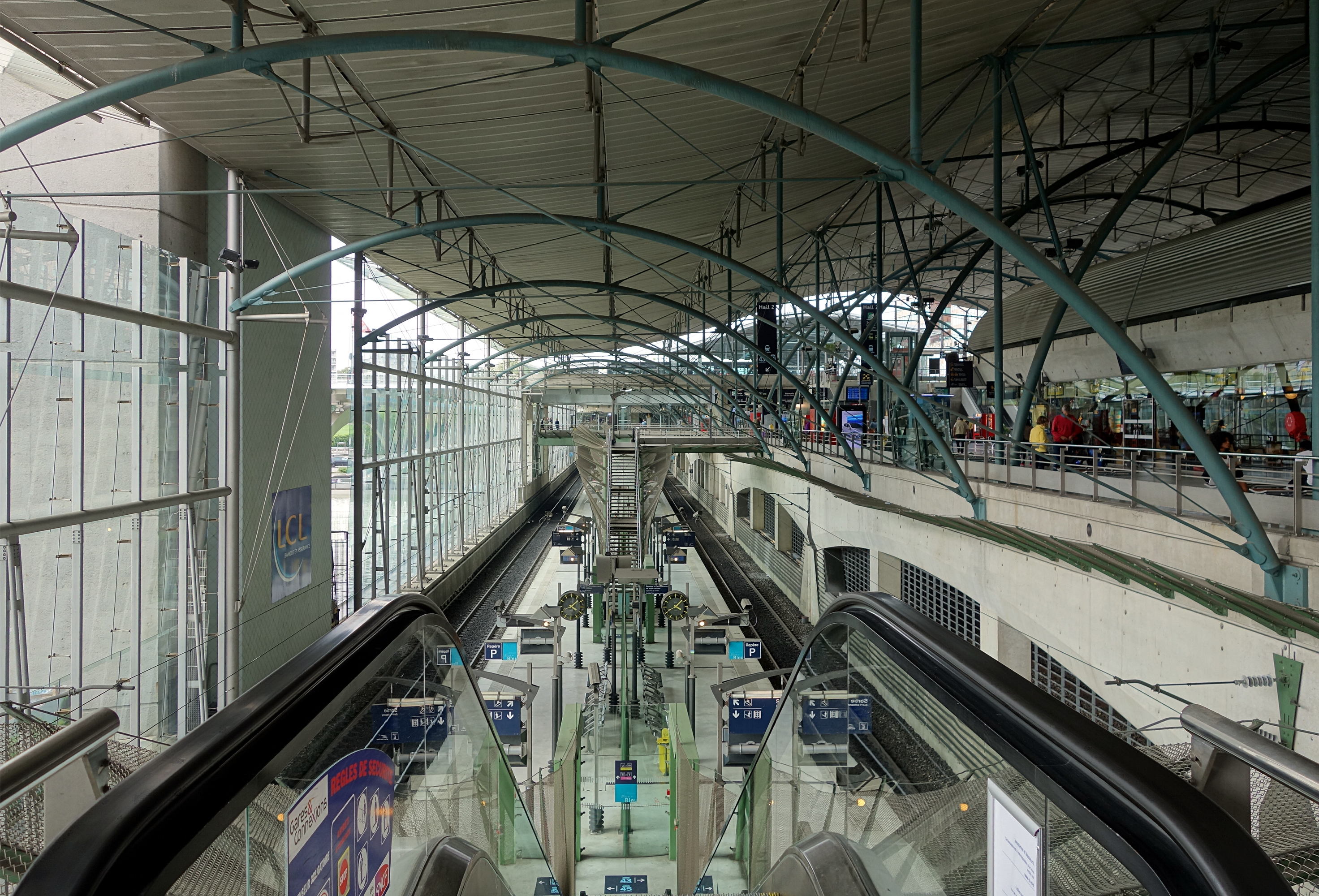 L'intérieur de la gare de Lille Europe à Lille.